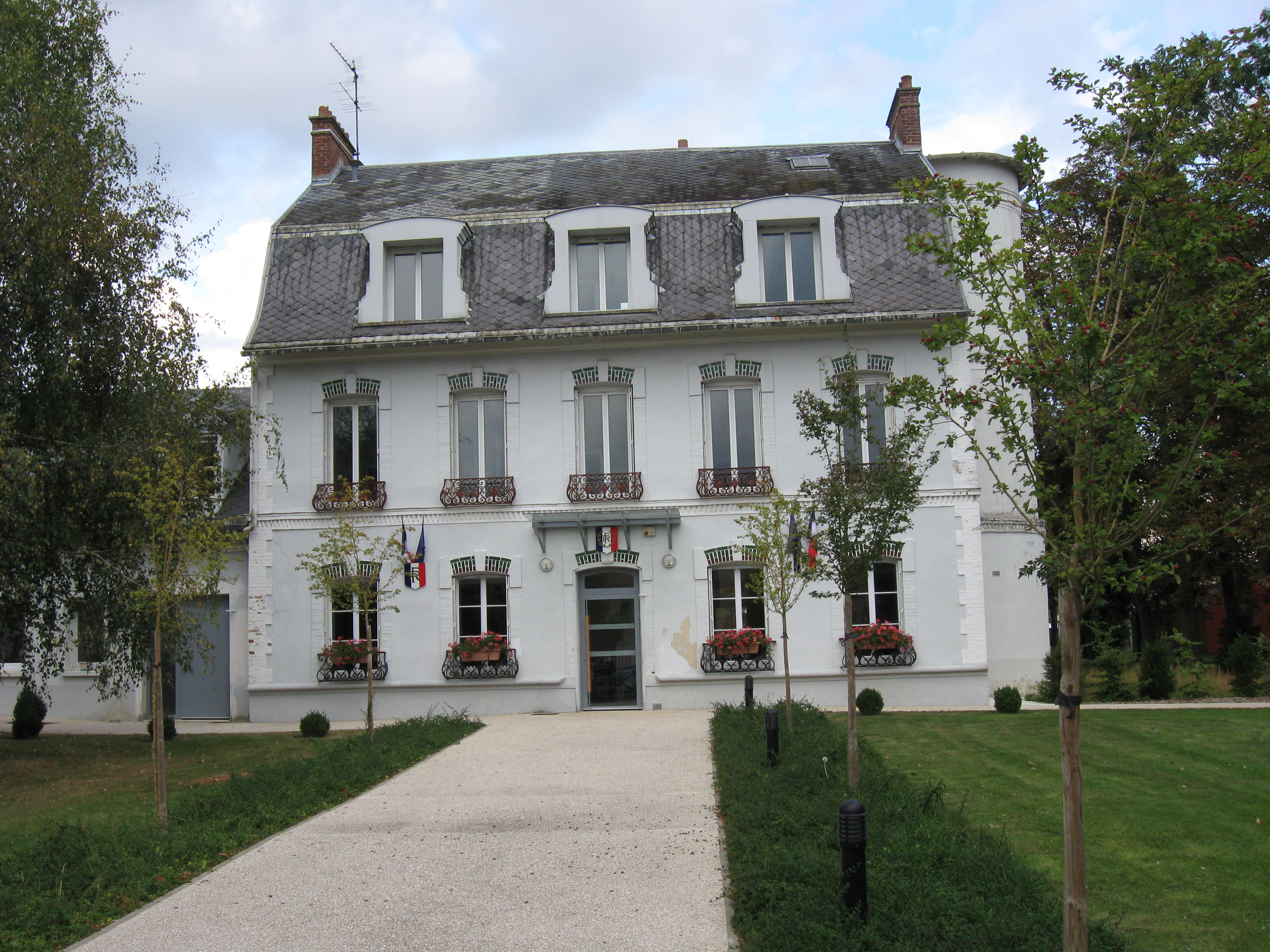 Mairie de Vignely. (Seine-et-Marne, région Île-de-France).